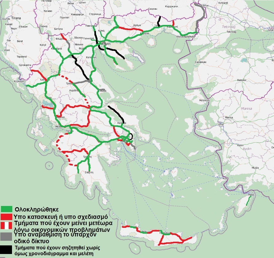 Template:Πληροφορίες εικόνας